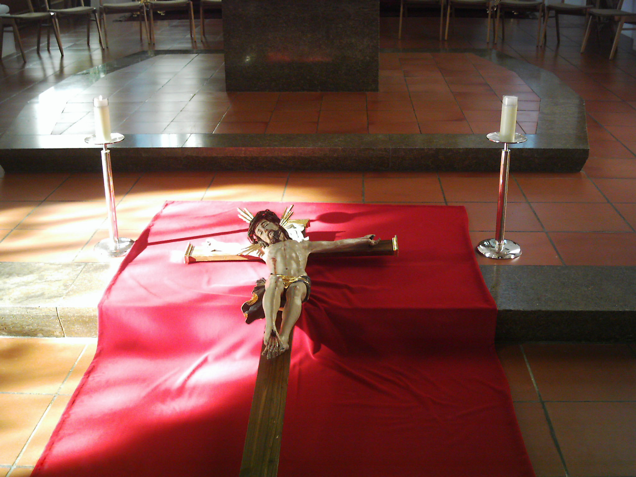 Röm.-kath. Pfarrkirche St. Martin in Tannheim. Am Karfreitag wird das Kruzifix vor den Altar gelegt. Priester, Ministranten und die Gemeinde ziehen in einer Prozession an ihm vorbei und machen eine Kniebeuge. Die Kommunionkinder legen Blumen auf das rote Tuch.